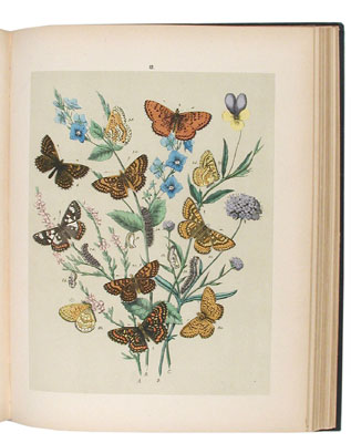 Plate from "Ueber sekundäre geschlechtscharaktere nordischer tagfalter". Stockholm (1880)